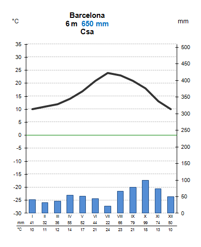 Barcelona kliimadiagramm